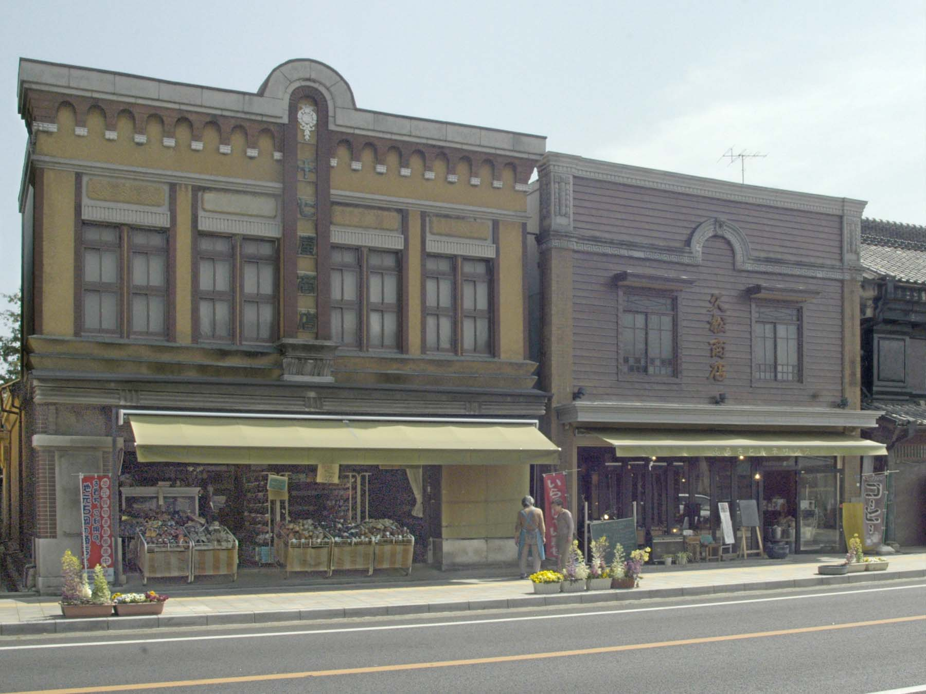 左側は「十七屋履物店」（登録文化財）。1930年建築。木造軸組二階建構造の左官系看板建築。 右側は「久松商店」（登録有形文化財）。1930年頃の建築。木造二階建構造の銅板貼り看板建築。太平洋戦争中に銅板を供出させられていたが、文化財登録を受けるにあたり当初の姿に復元された。銅板貼りは経年によって緑青が出ていい感じの緑色になっているものがほとんどだが、これは新品時代の風情を残す貴重な建築物となっている。